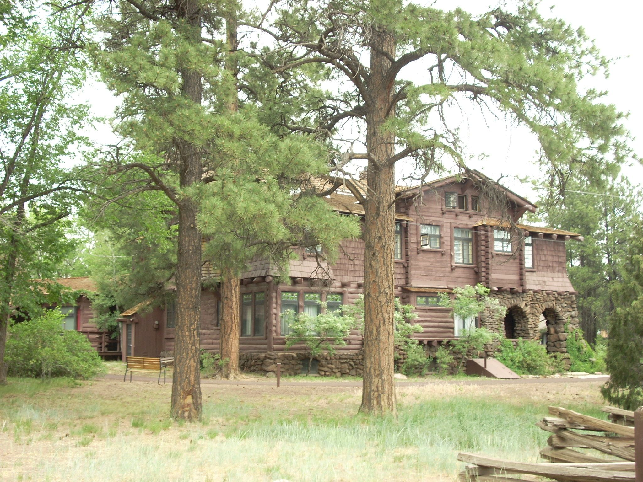 Flagstaff, Arizona.